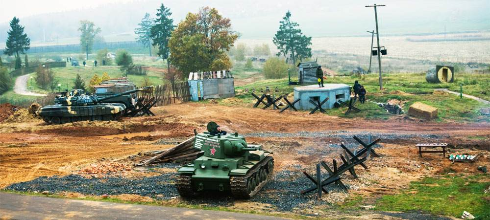 Поле, на котором реконструируются бои